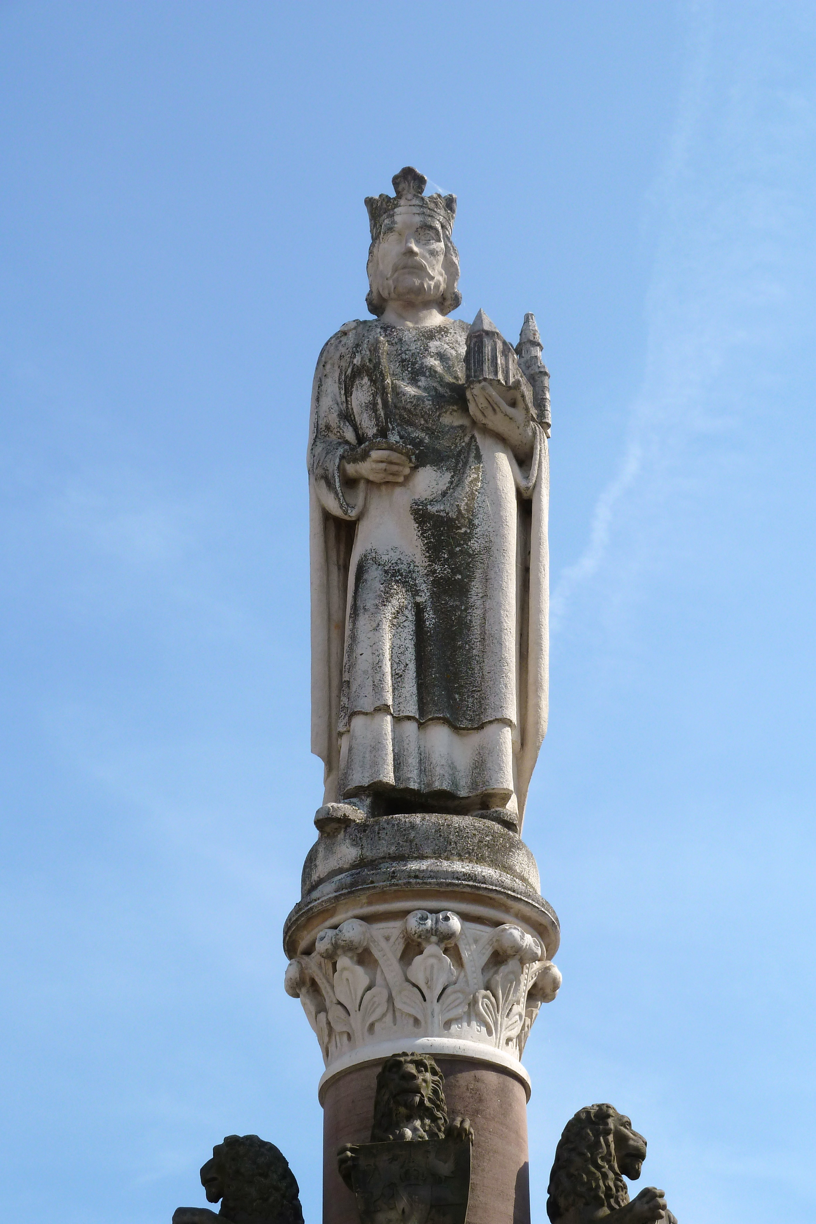 Heinrichsbrunnen auf dem Markt in Meiningen, lebensgroße Statue vom Namensgeber Kaiser Heinrich II.